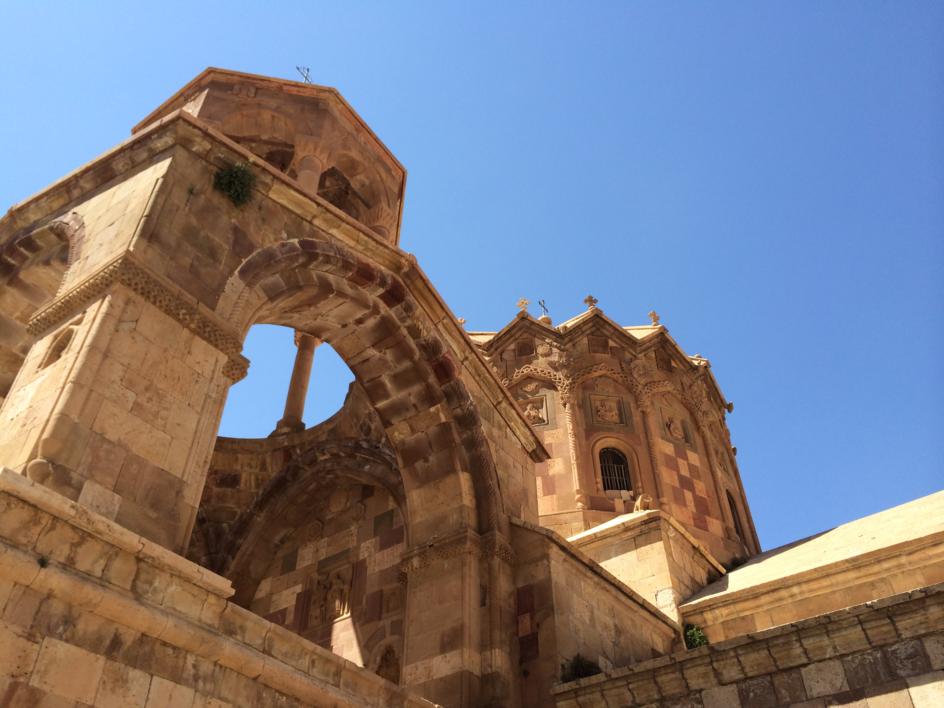 کلیسای سن استپانوس